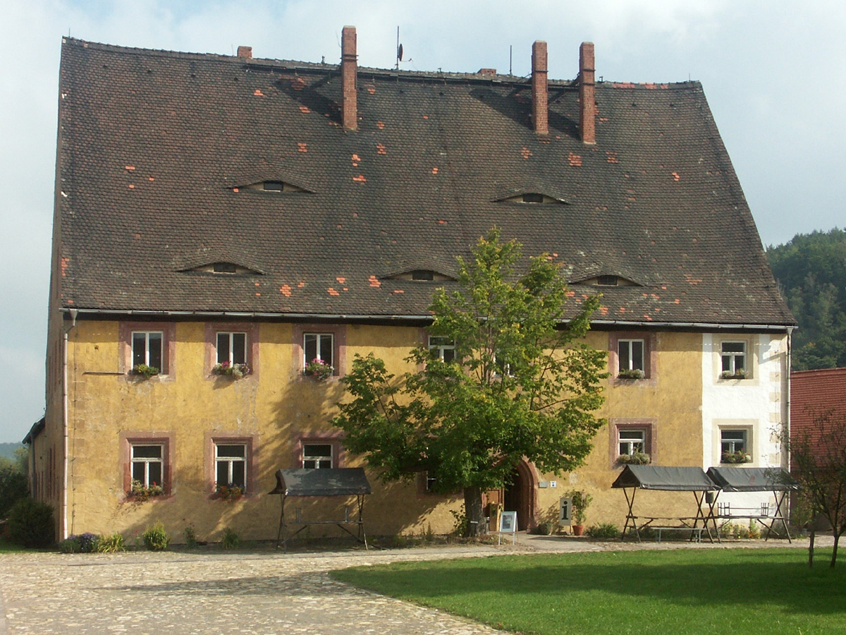 Kloster Buch: Das Abthaus